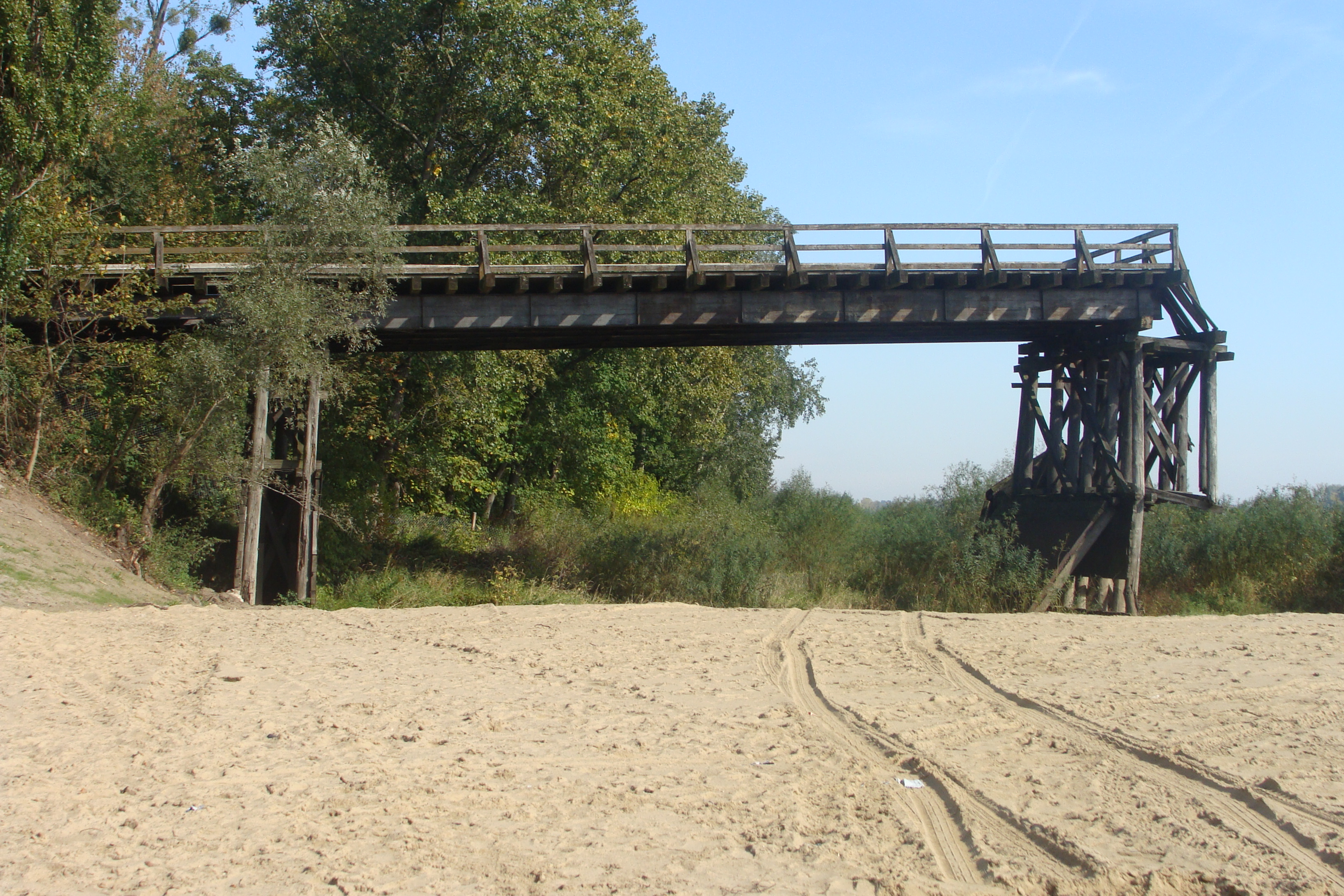 Stary drewniany most na Wiśle w Wyszogrodzie został zbudowany przez Niemców w 1916 roku, później był wielokrotnie przebudowywany. Wykonano go z drewna pochodzącego z Puszczy Kampinoskiej, miał długość 1300 m i liczył 60 przęseł. Most został rozebrany pod koniec 1999 roku, do tego czasu był uważany za najdłuższy most drewniany w Europie.